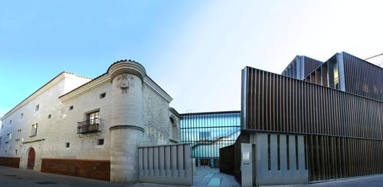 Museos Bibat en el casco medieval de Vitoria-Gasteiz (Museo Fournier de Naipes y Museo de Arqueología).